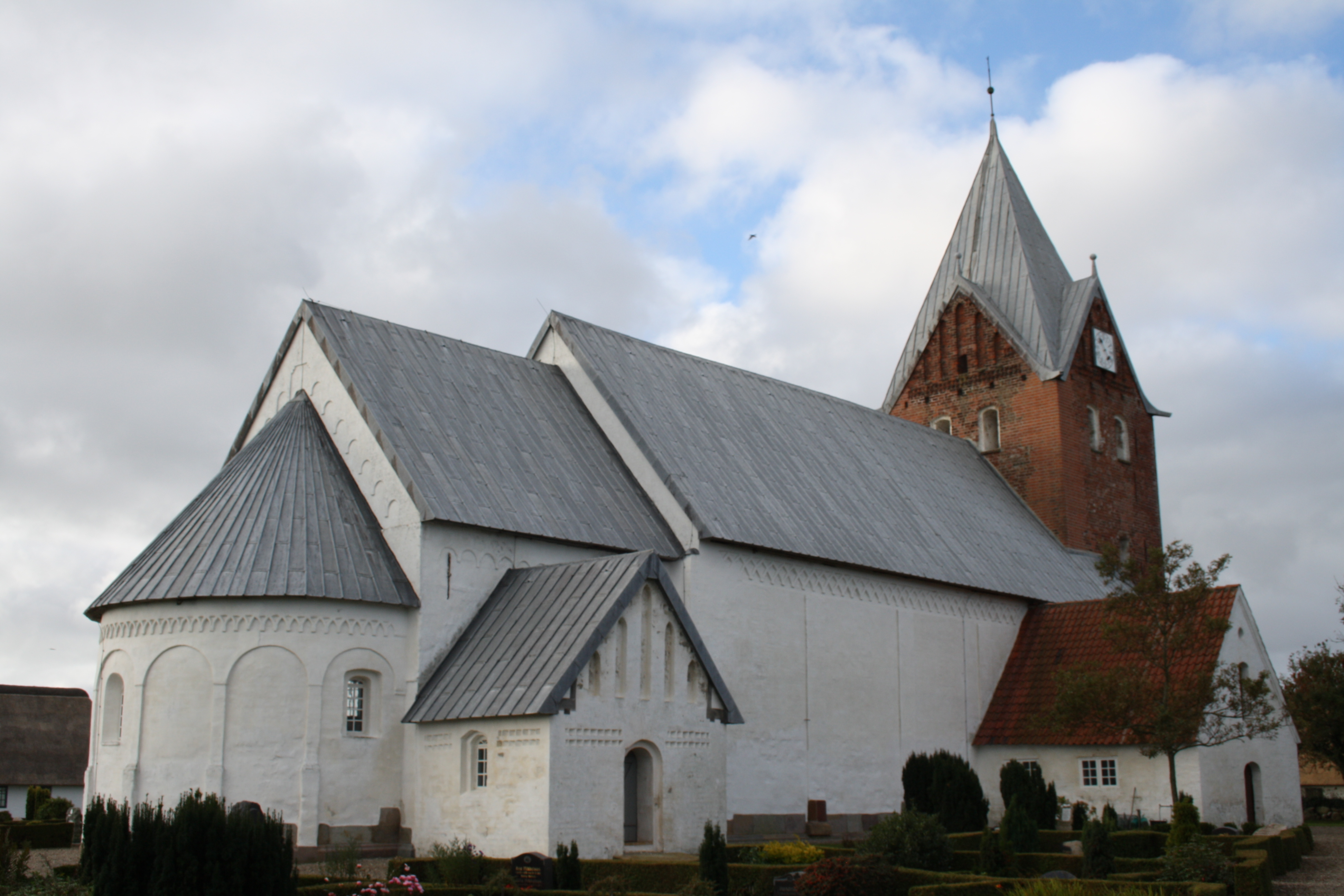 Kirche von Ballum